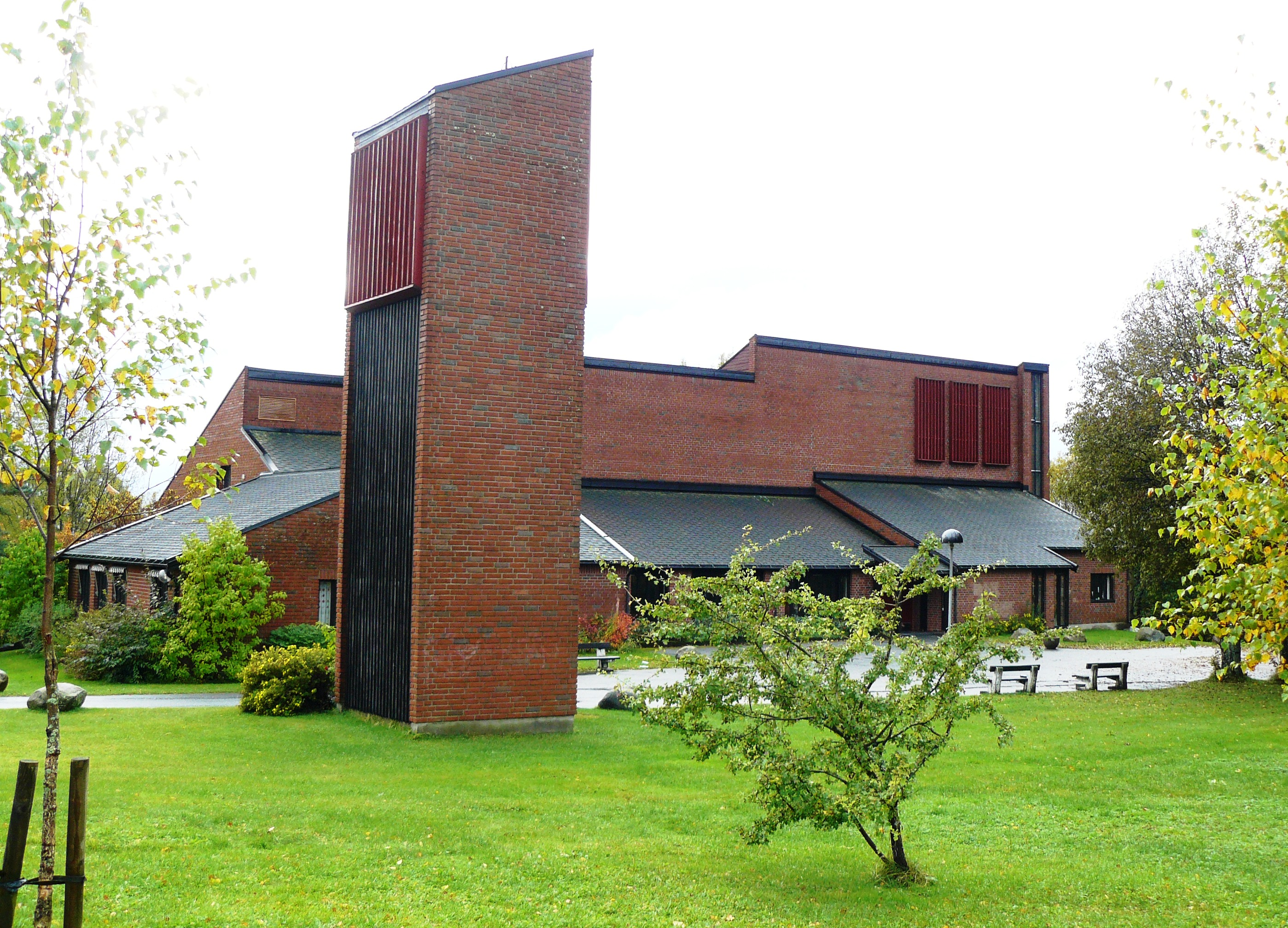 Furuset church, Oslo